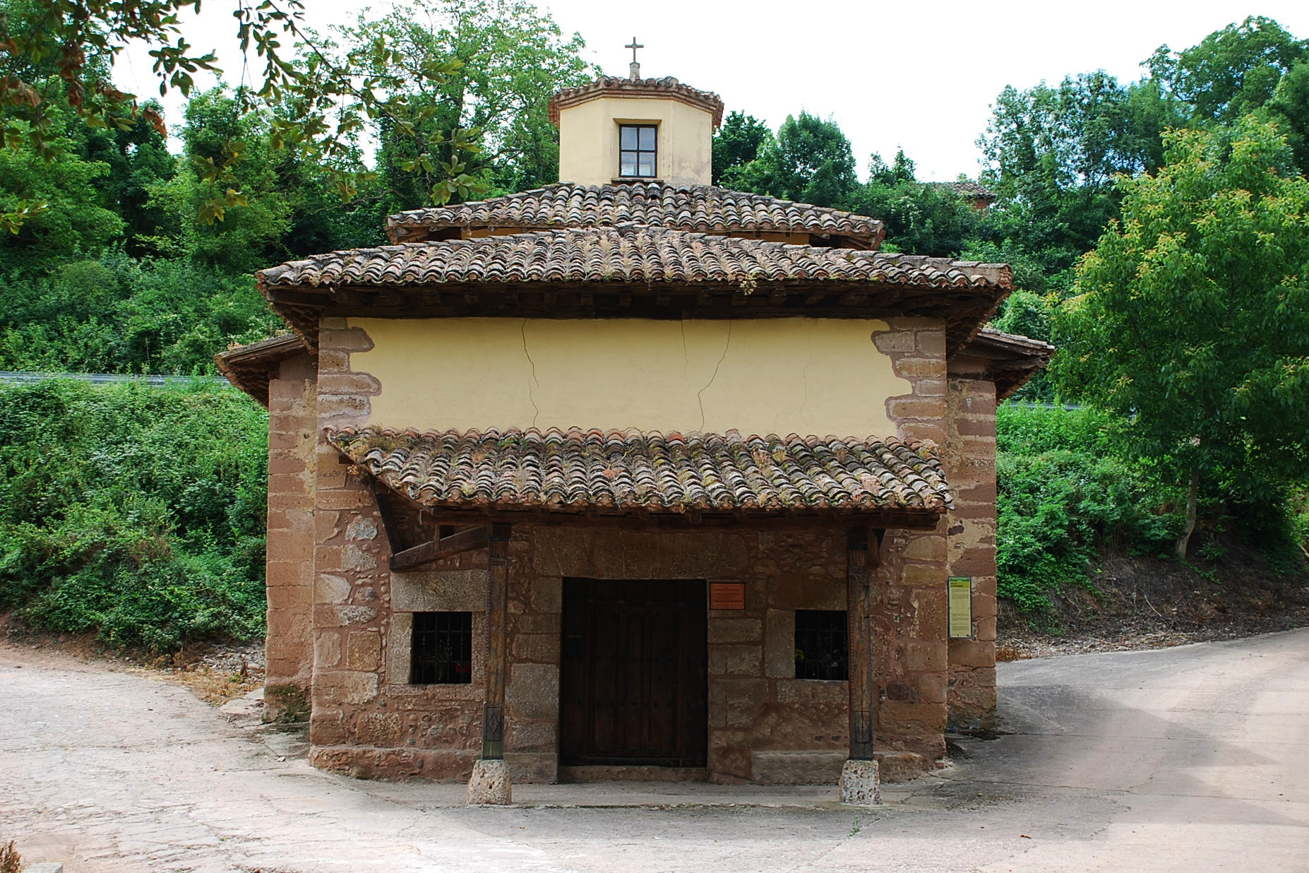 Ermita de la Concepción - Matute (La Rioja - España)